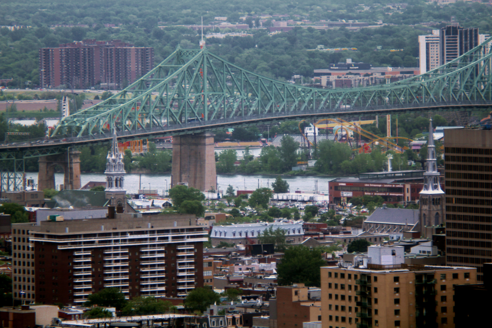 Vue sur le Pont Jacques-Cartier, LaRonde et Le centre-Sud, du Mont-Royal